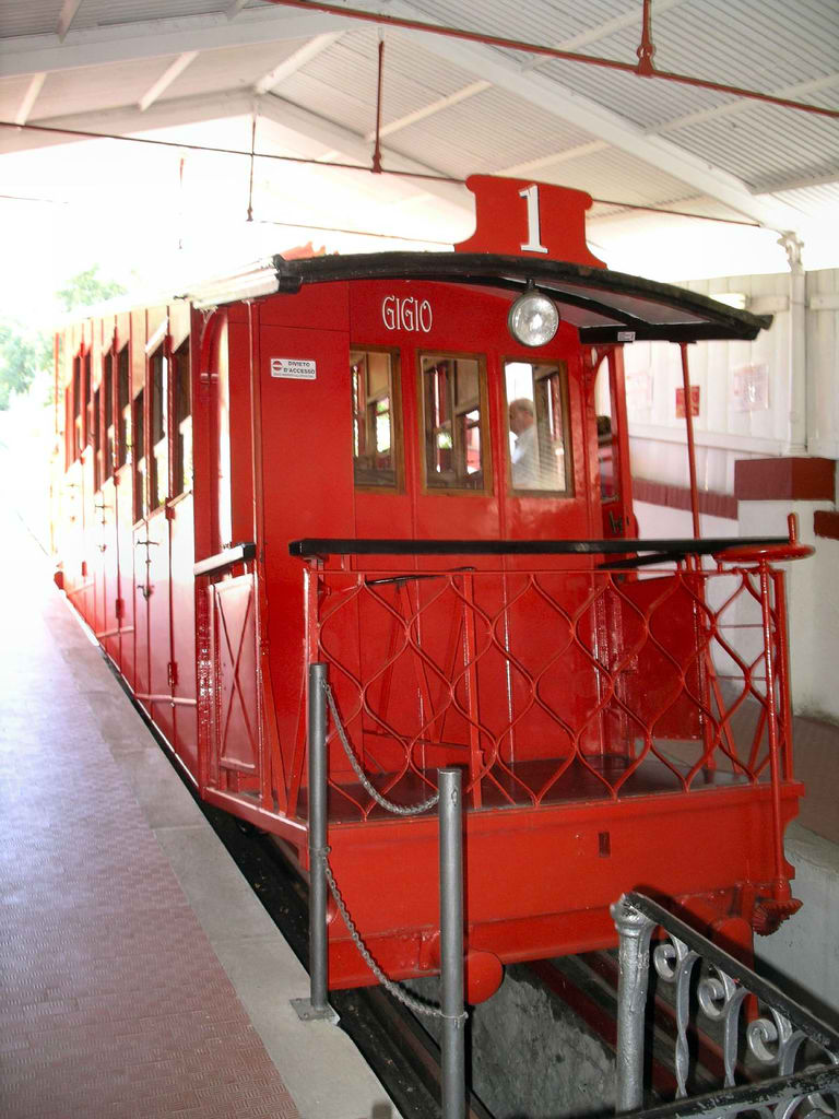 Funiculare Montecatini Terme - Italia.